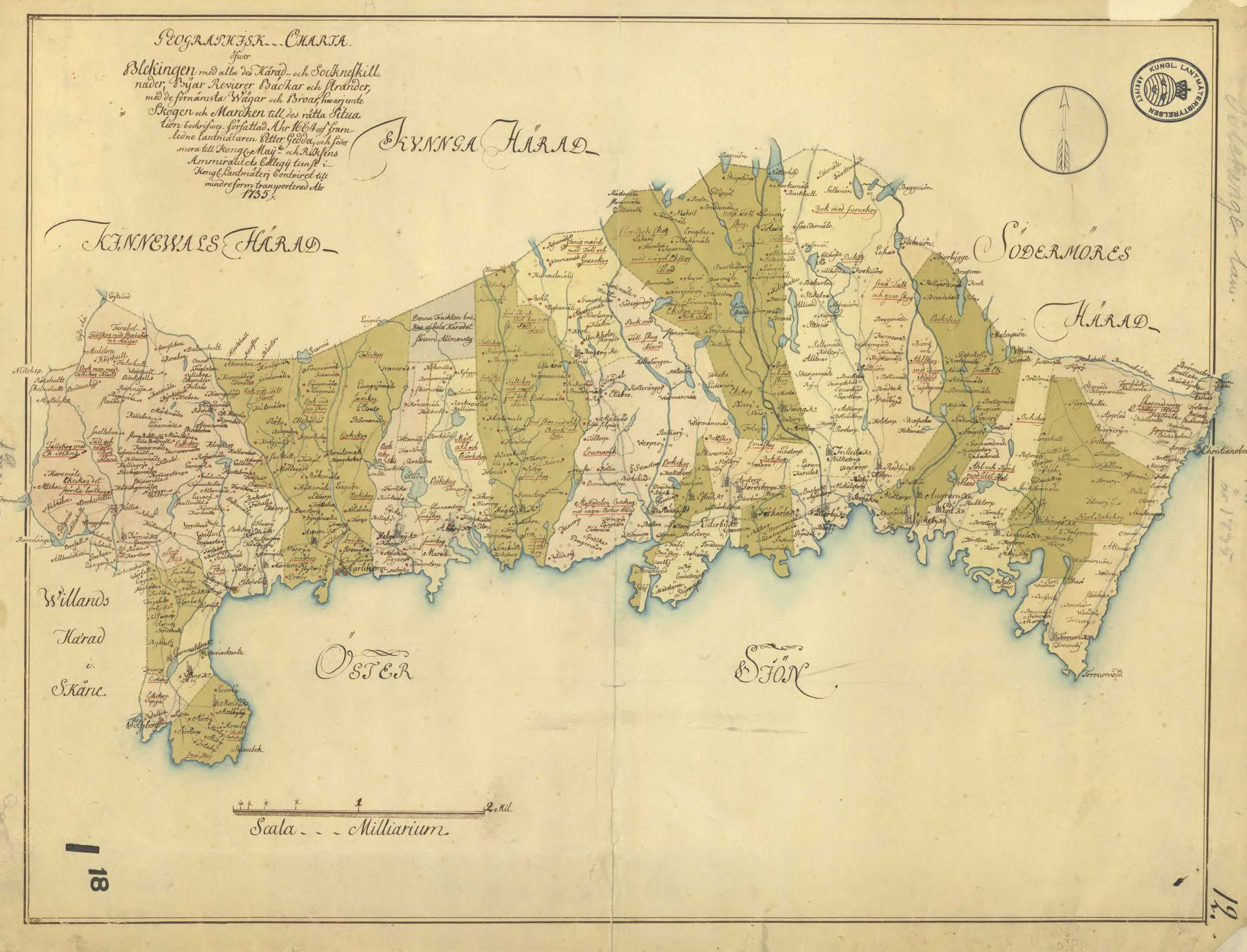 Äldre karta över Blekinge.